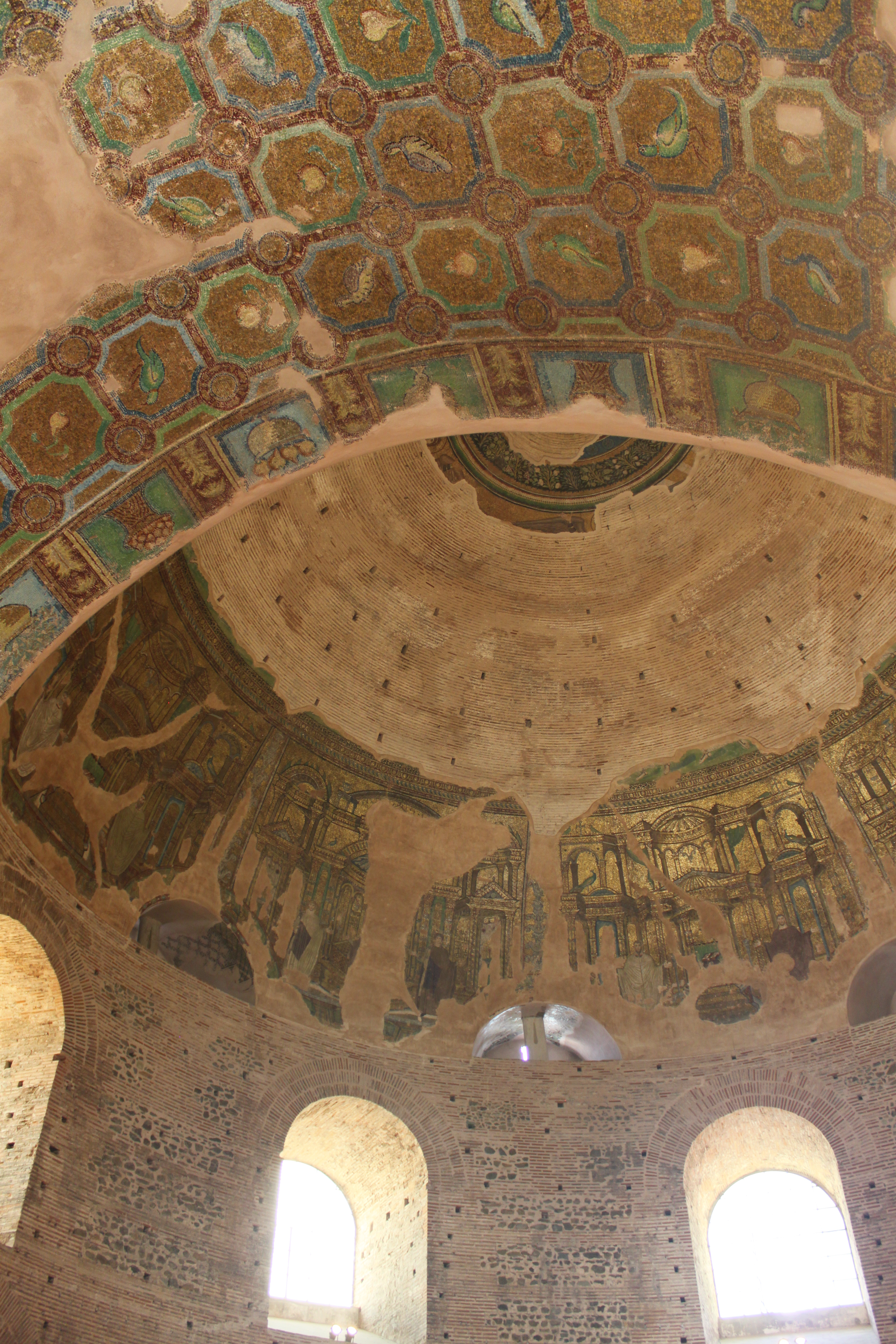 Mosaïques de la Rotonde